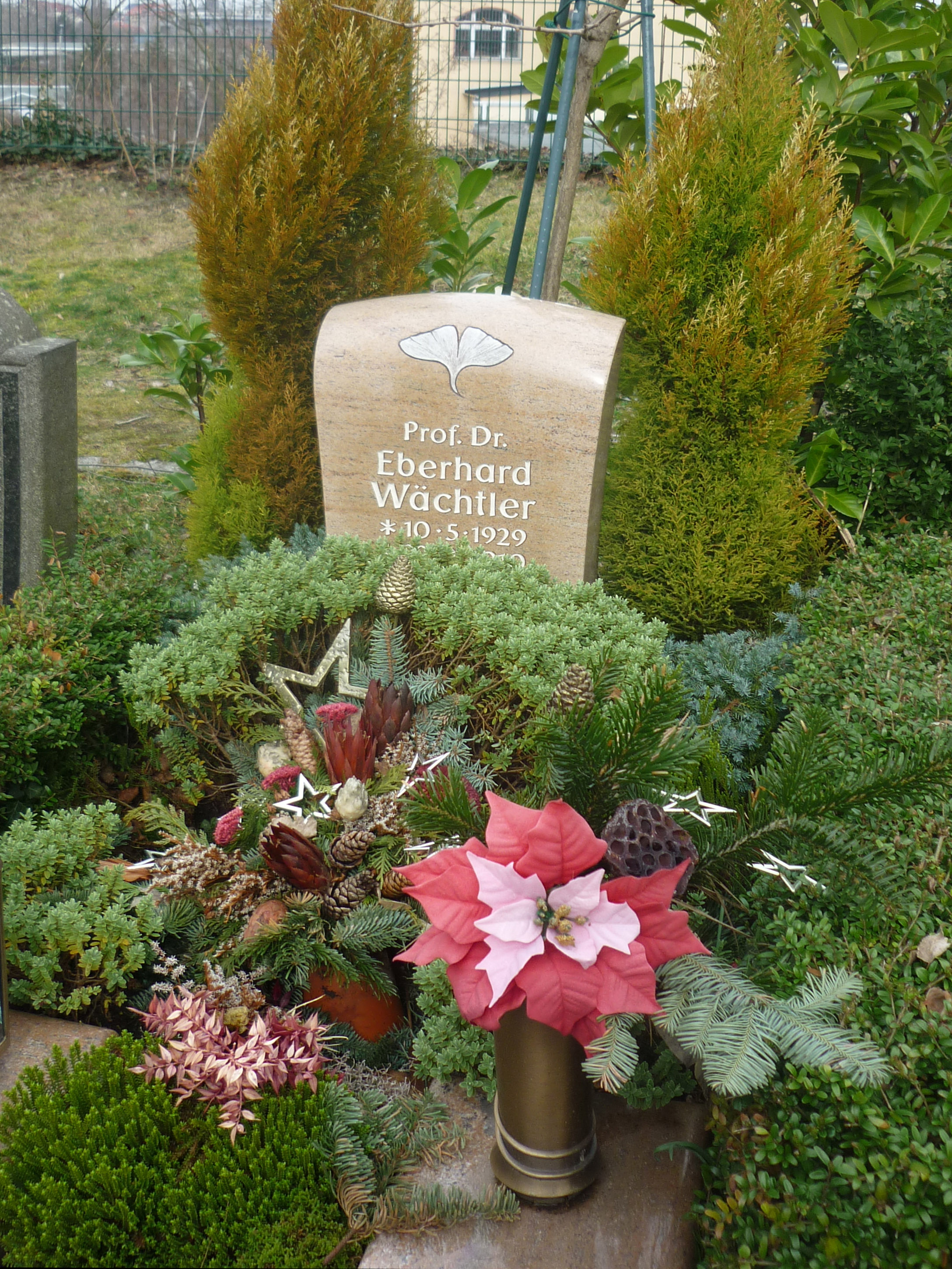 Alter Annenfriedhof in Dresden-Südvorstadt, Grab Eberhard Wächtler (1929–2010), Wirtschaftshistoriker, Prof. an der Bergakademie Freiberg